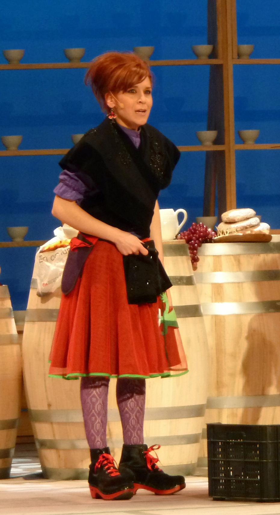 Isabel Risco na gala dos premios María Casares 2014.